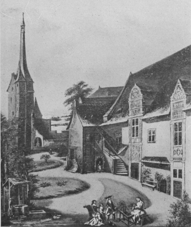 Gravure d'après un tableau de Chomereau représentant la cour du château de Laval, France.